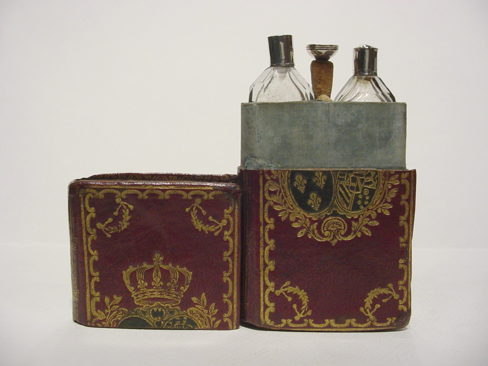 Estuche de cuero en forma de libro, con dos botellas de perfume y un pequeño embudo. Con el escudo de armas en oro de la reina Maria Antonieta de Francia. En cuero de color grana. Perteneció a la reina María Antonieta de Francia (esposa de Luís XVI), éste fue un regalo de Navidad tal como indica la inscripción del lomo "ETRENNES". Está decorado con el escudo de la reina en oro. Realizado en estilo Barroco, en el s.XVIII en Francia.